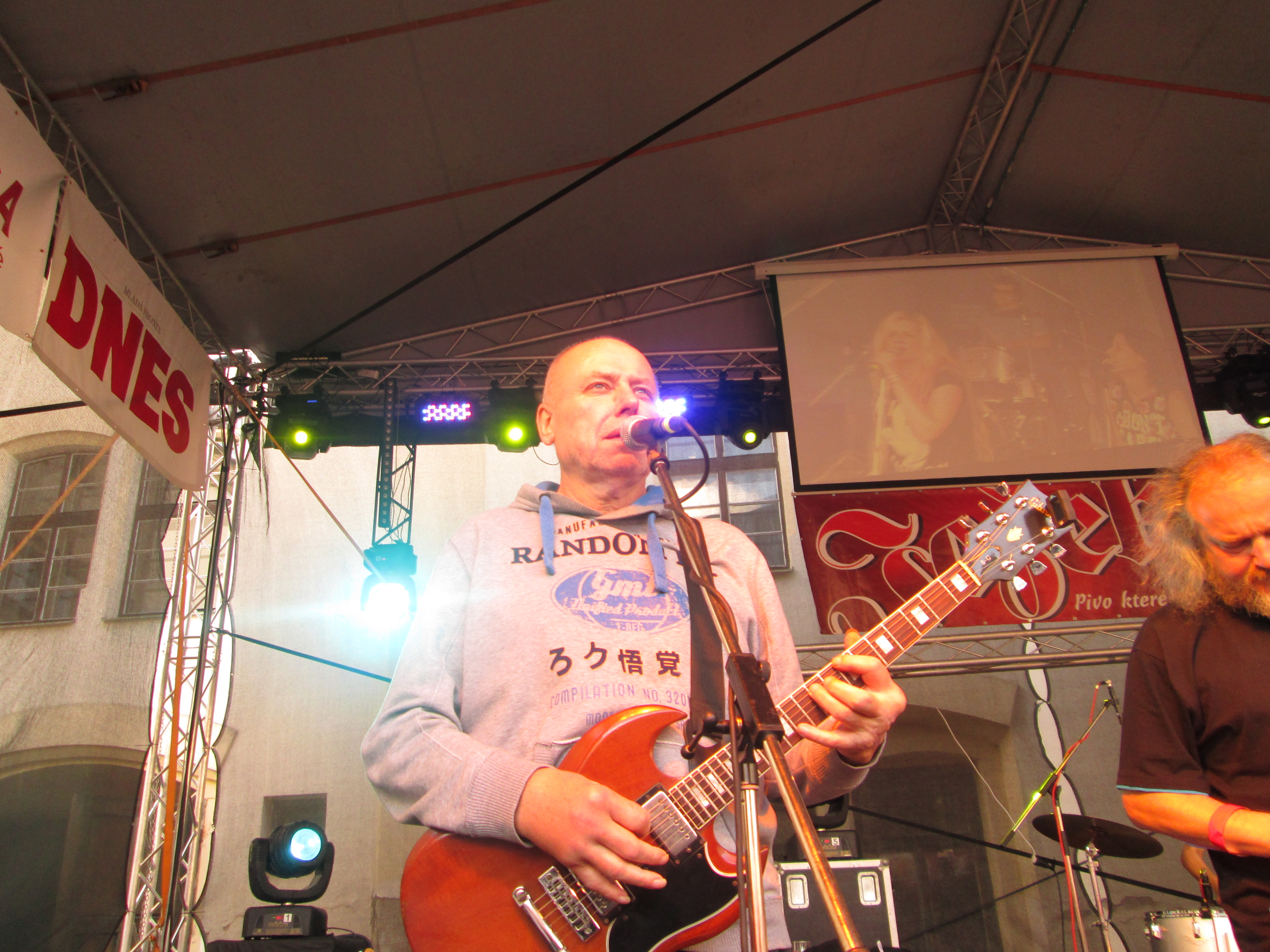 Hudba Praha na pivovarských slavnostech roku 2014 v Jihlavě